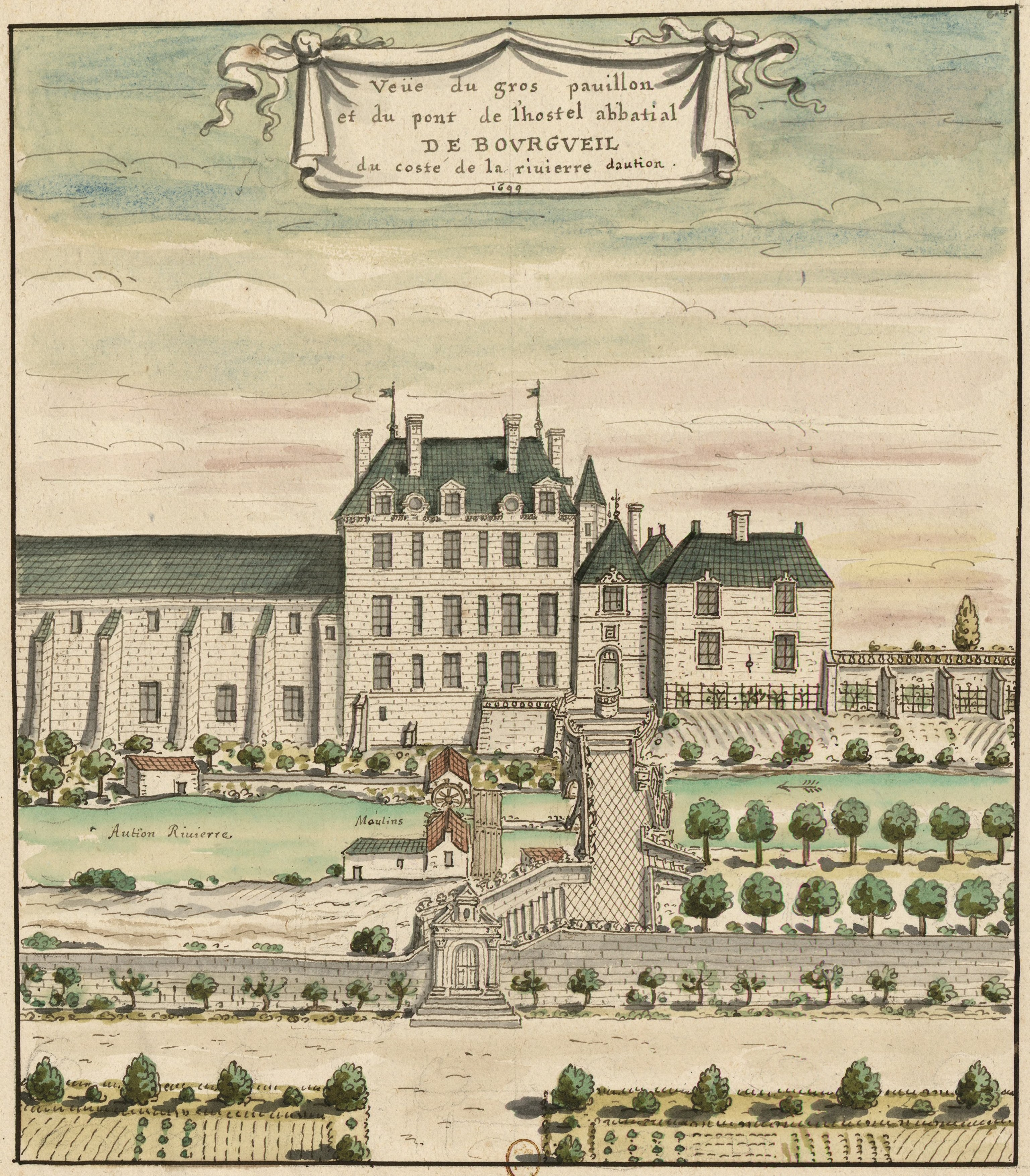 abbaye de Bourgueil Anjou Famille Le Clerc